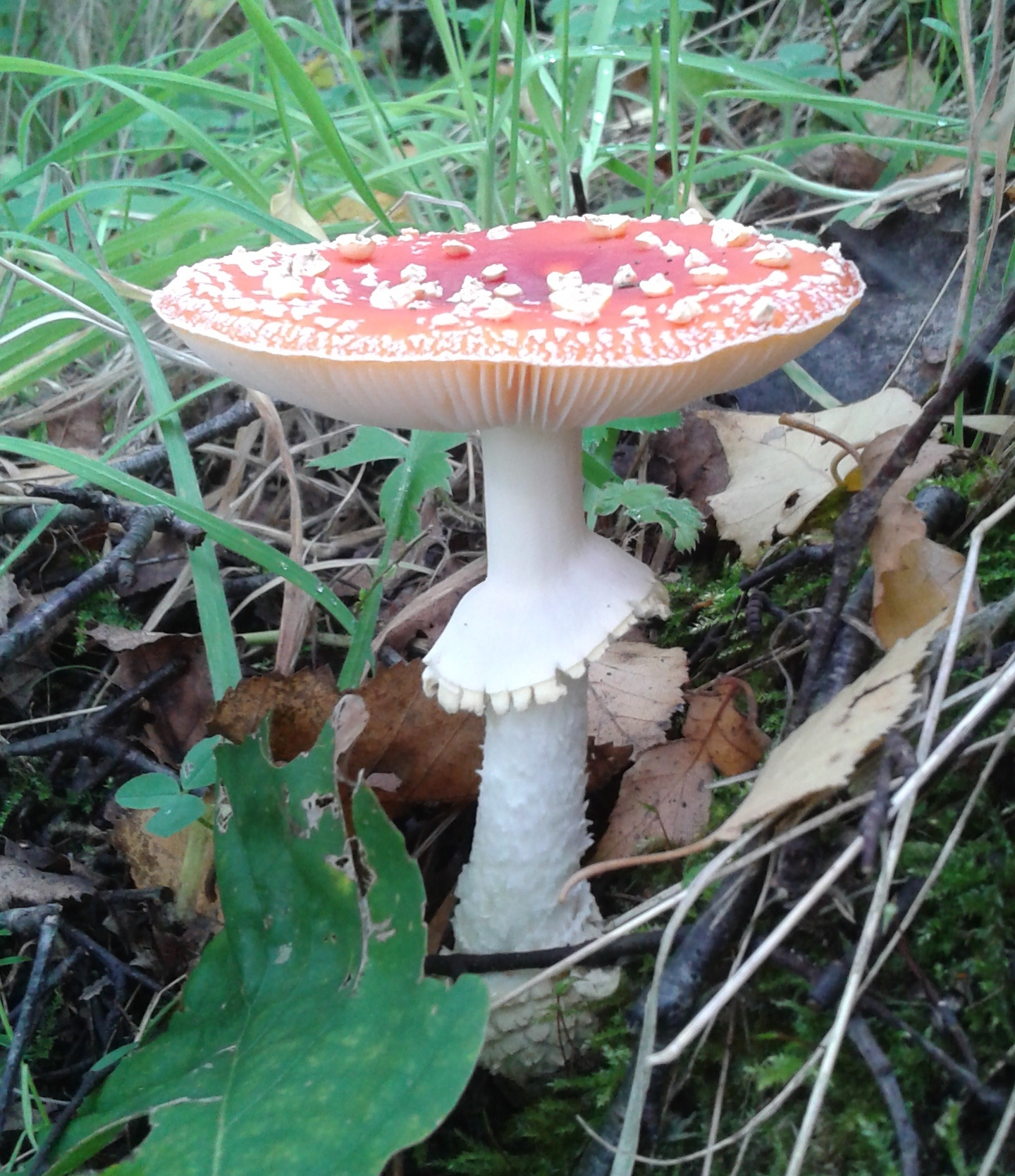 amanite tue mouche collerette intacte